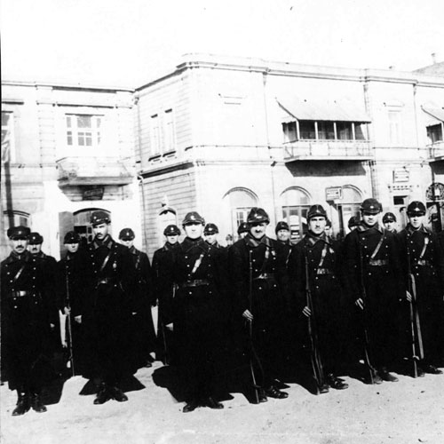 Бакинская милиция.